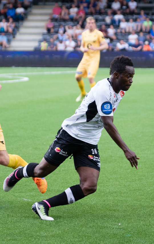 Mahatma Otoo en 2016